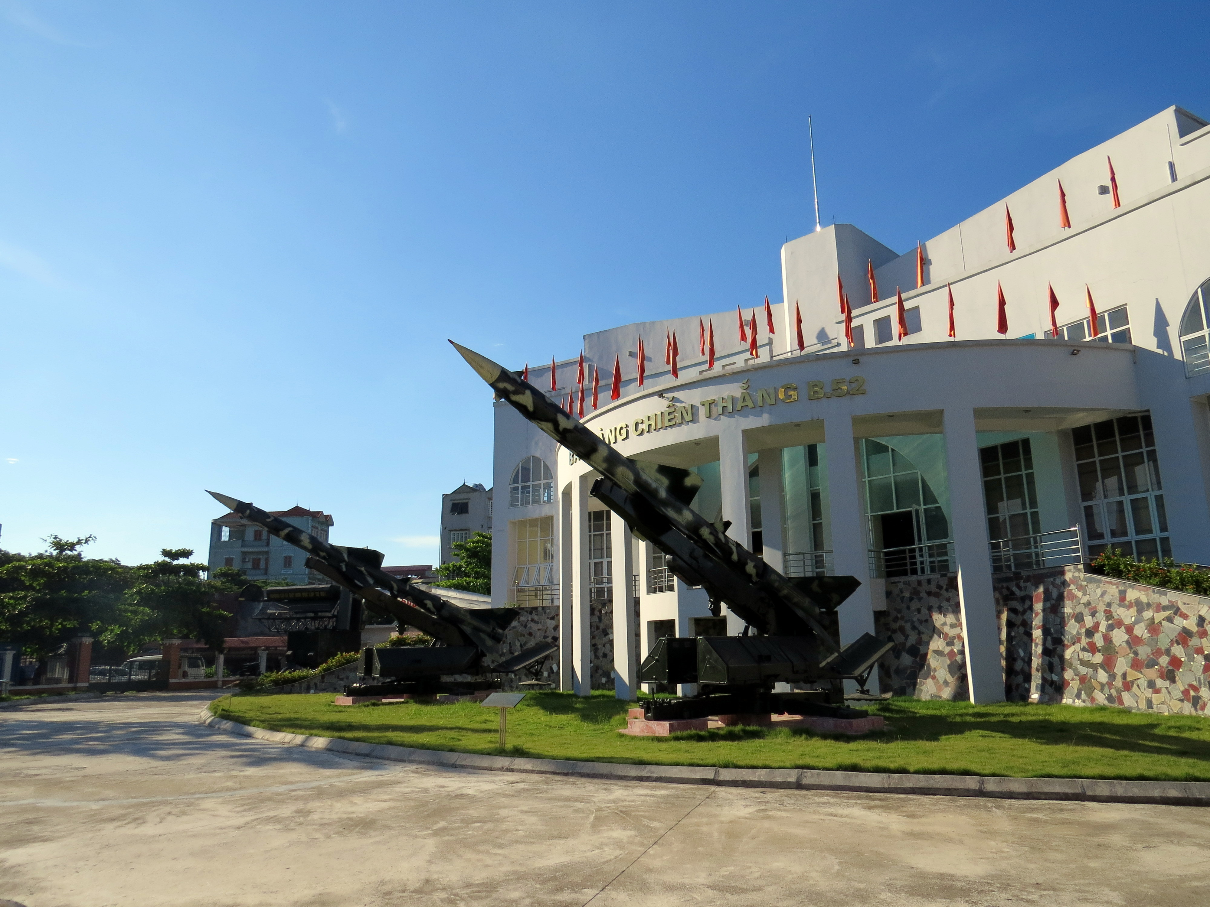 Bảo tàng Chiến thắng B52中文（台灣）: 越南的B52勝利博物館